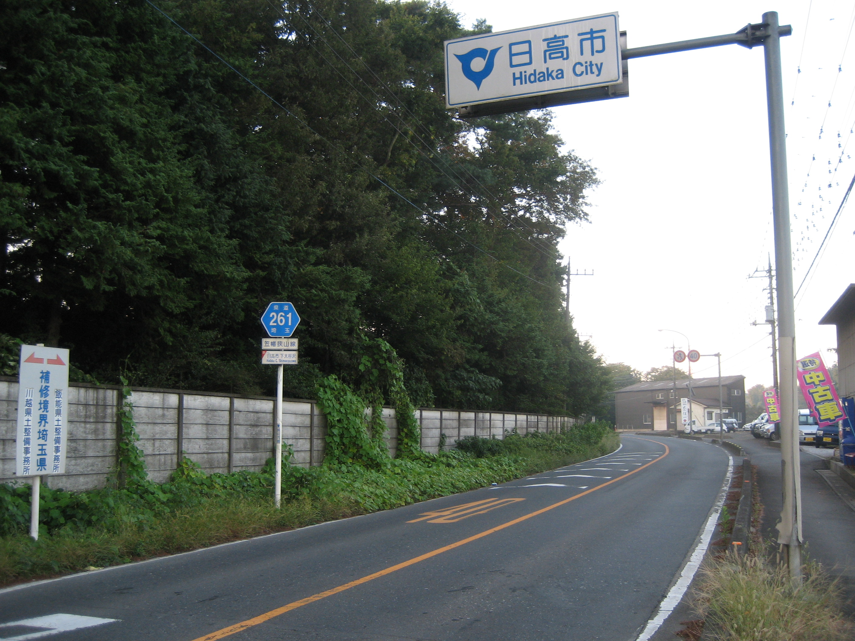 埼玉県道261号線川越市と日高市の境付近